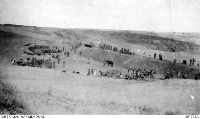 סוללת הרכבת מעל נחל הבשור - שלוחת ביר גימלי